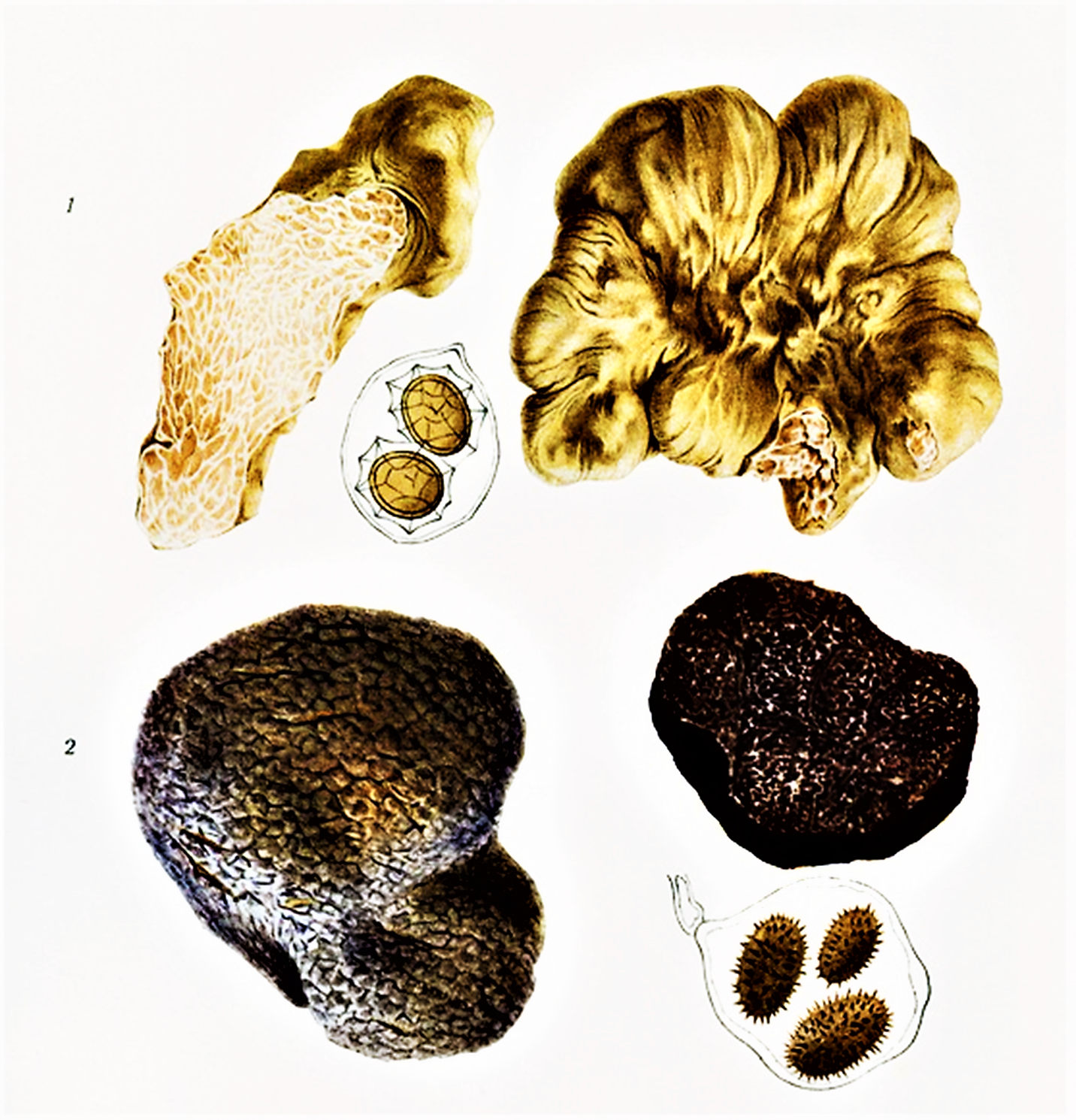 Giacomo Bresadola: Tuber magnatum Picco (1788) und Tuber melanosporum Carlo Vittadini (1831)